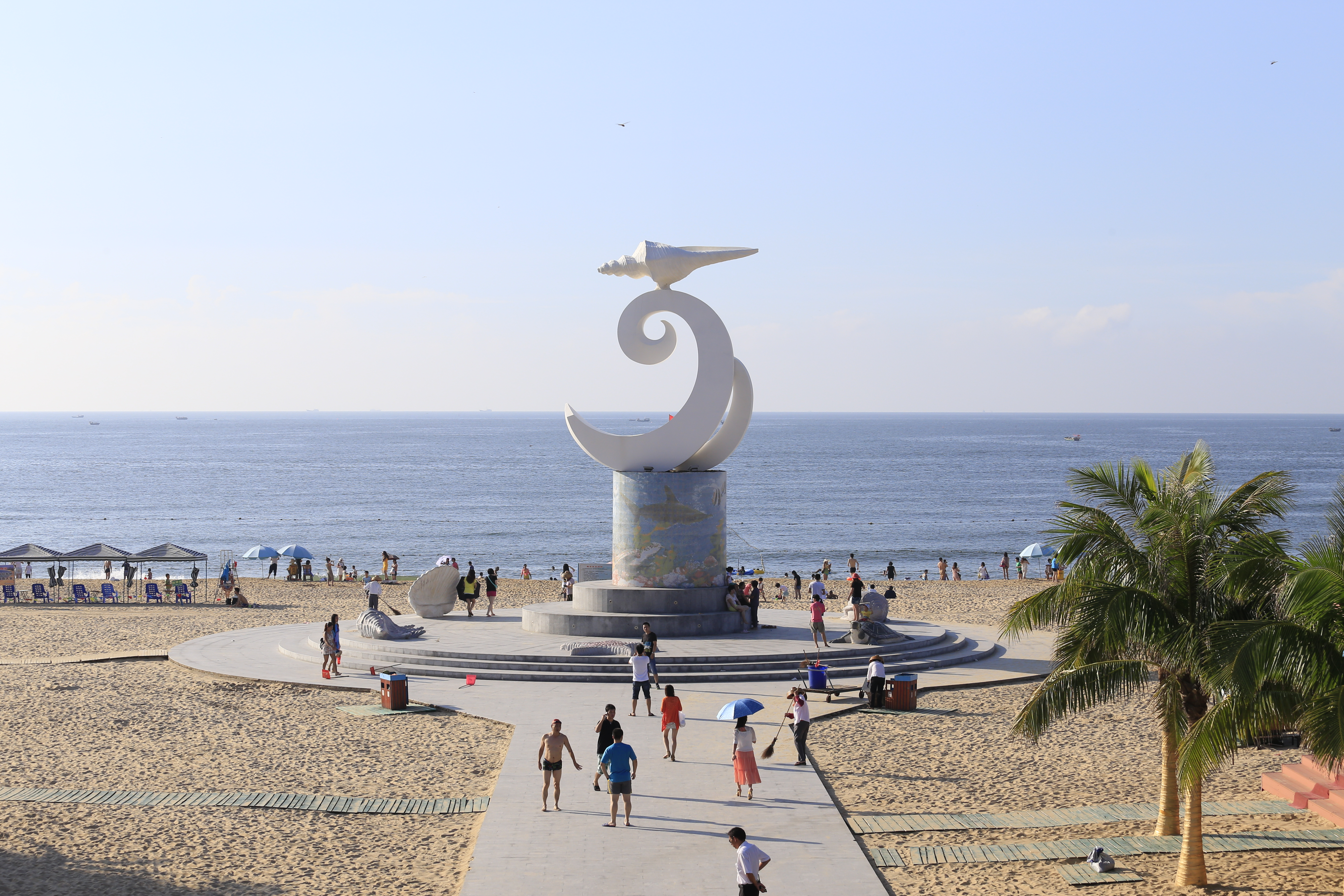 阳江海陵岛大角湾